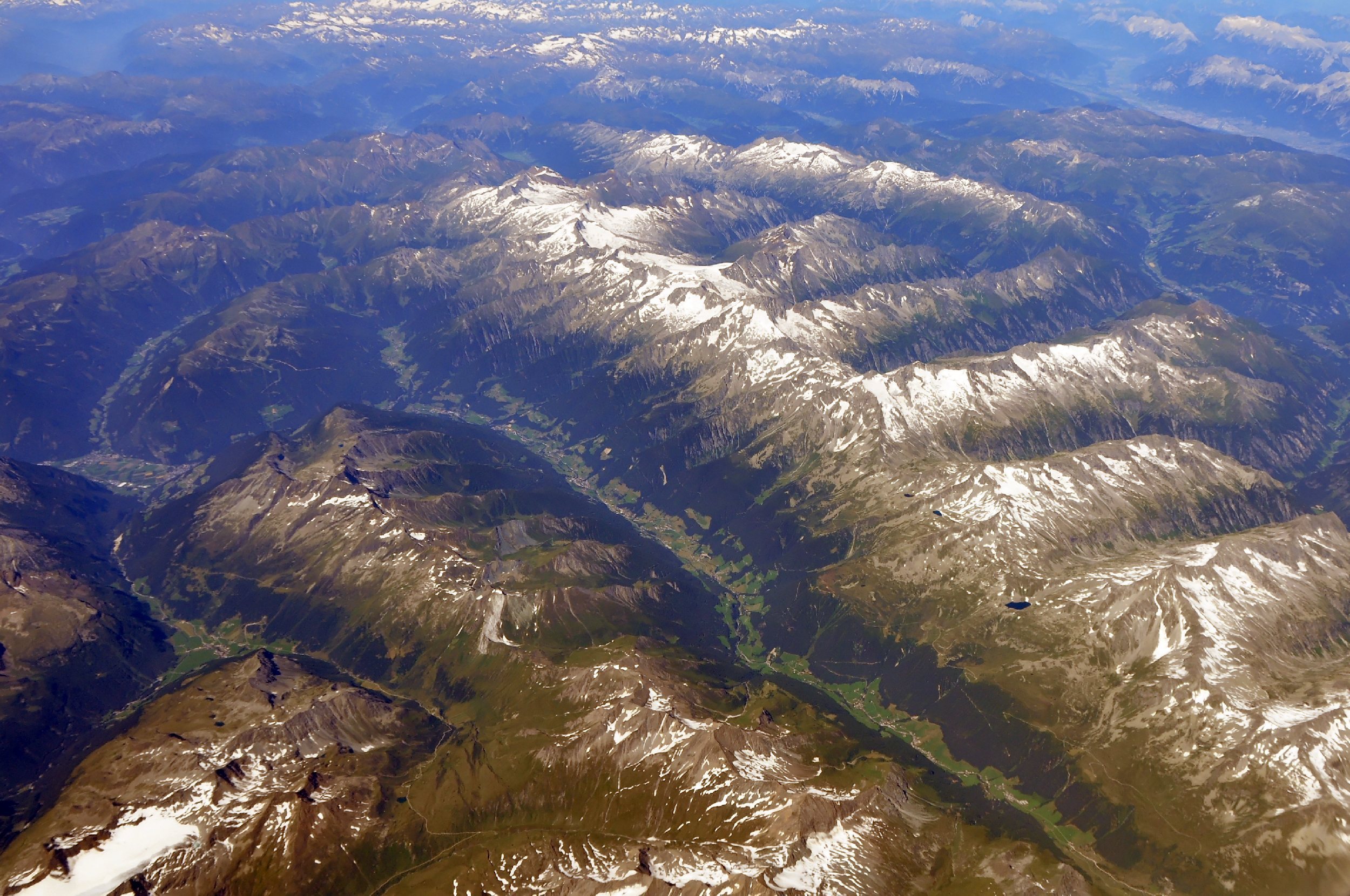 Bilder vom Flug Hannover Rom August 2014